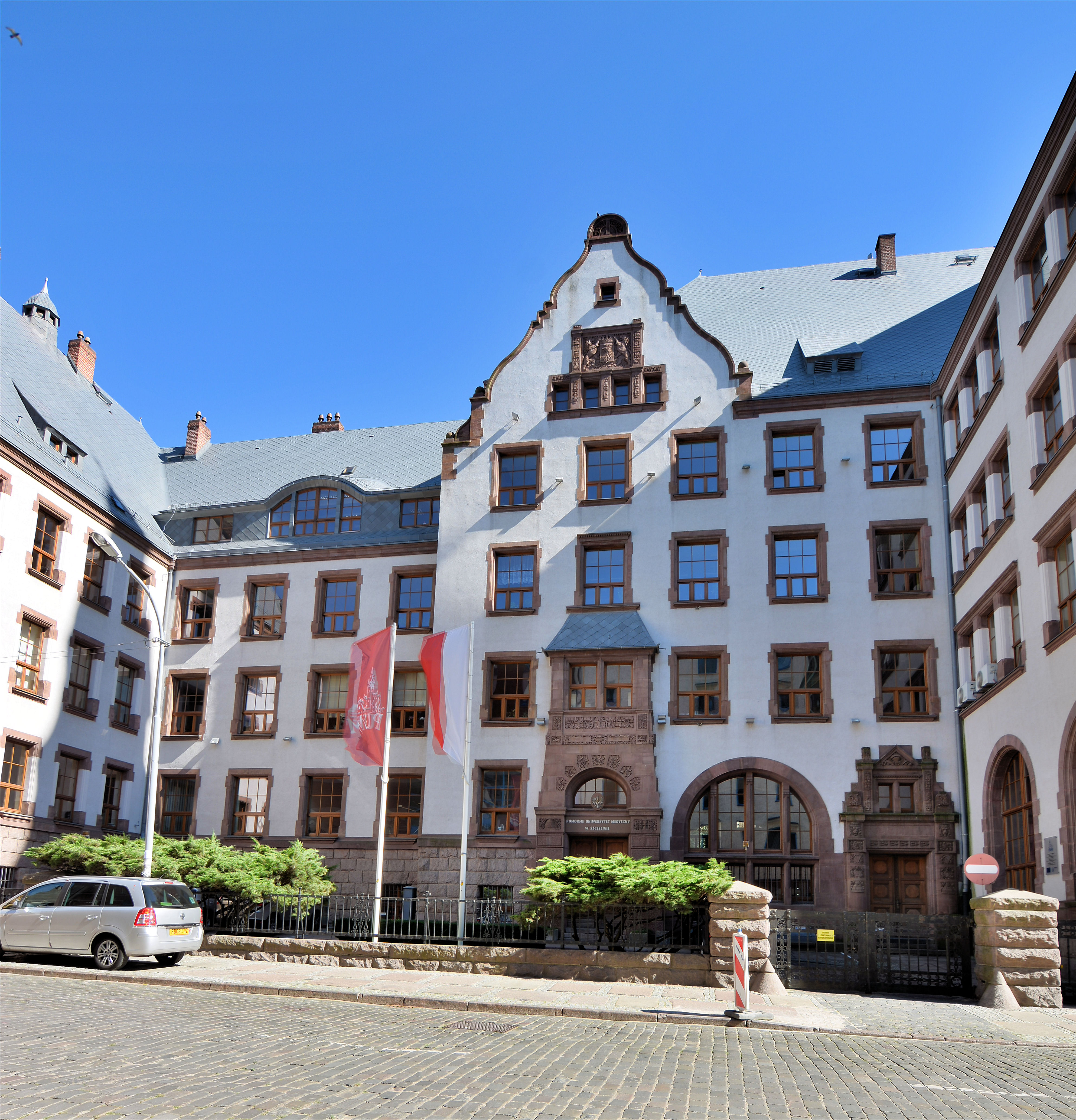 Rektorat Pomorskiego Uniwersytetu Medycznego w Szczecinie